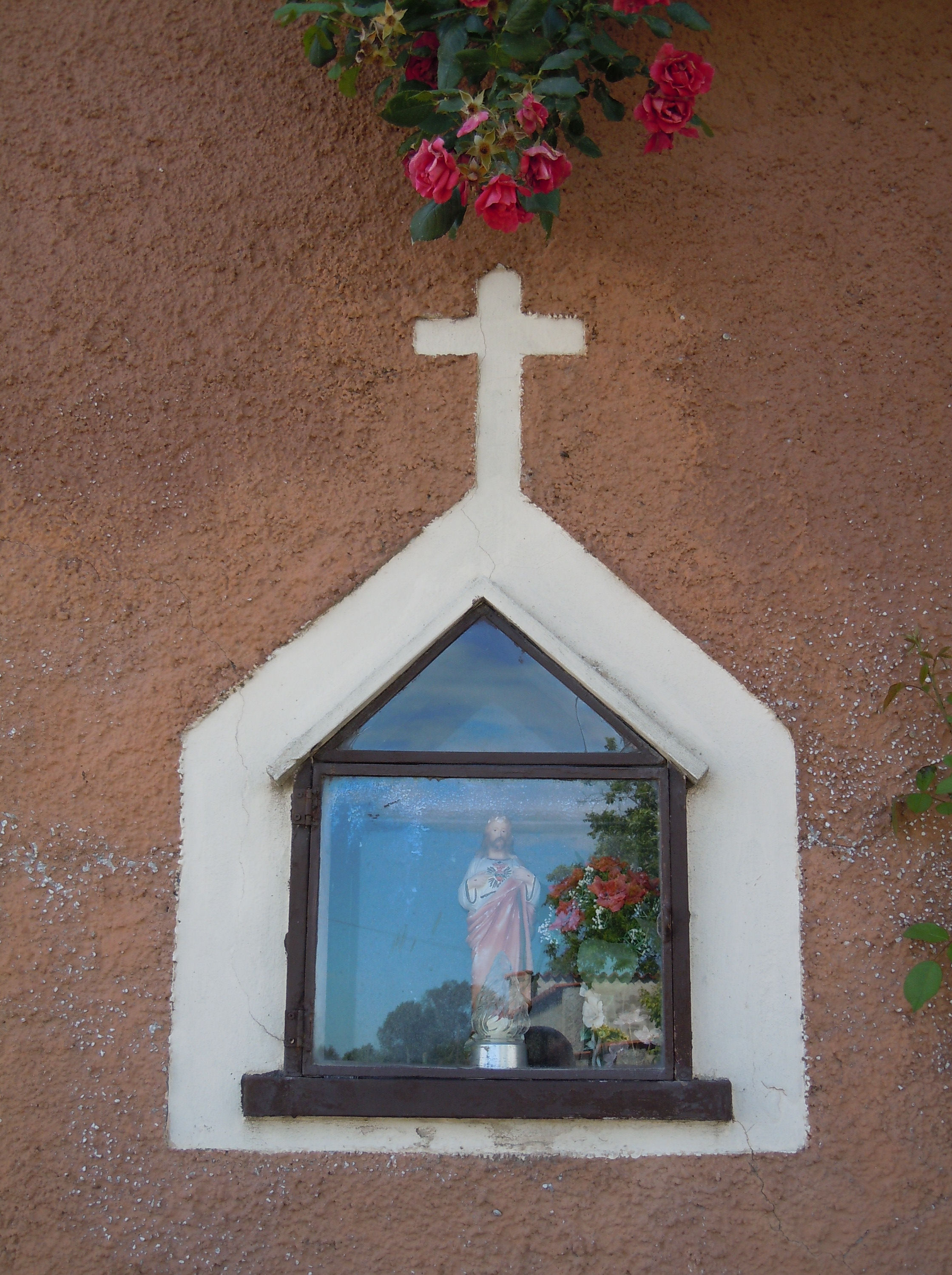 Casaloldo, santella in frazione Travagliati.